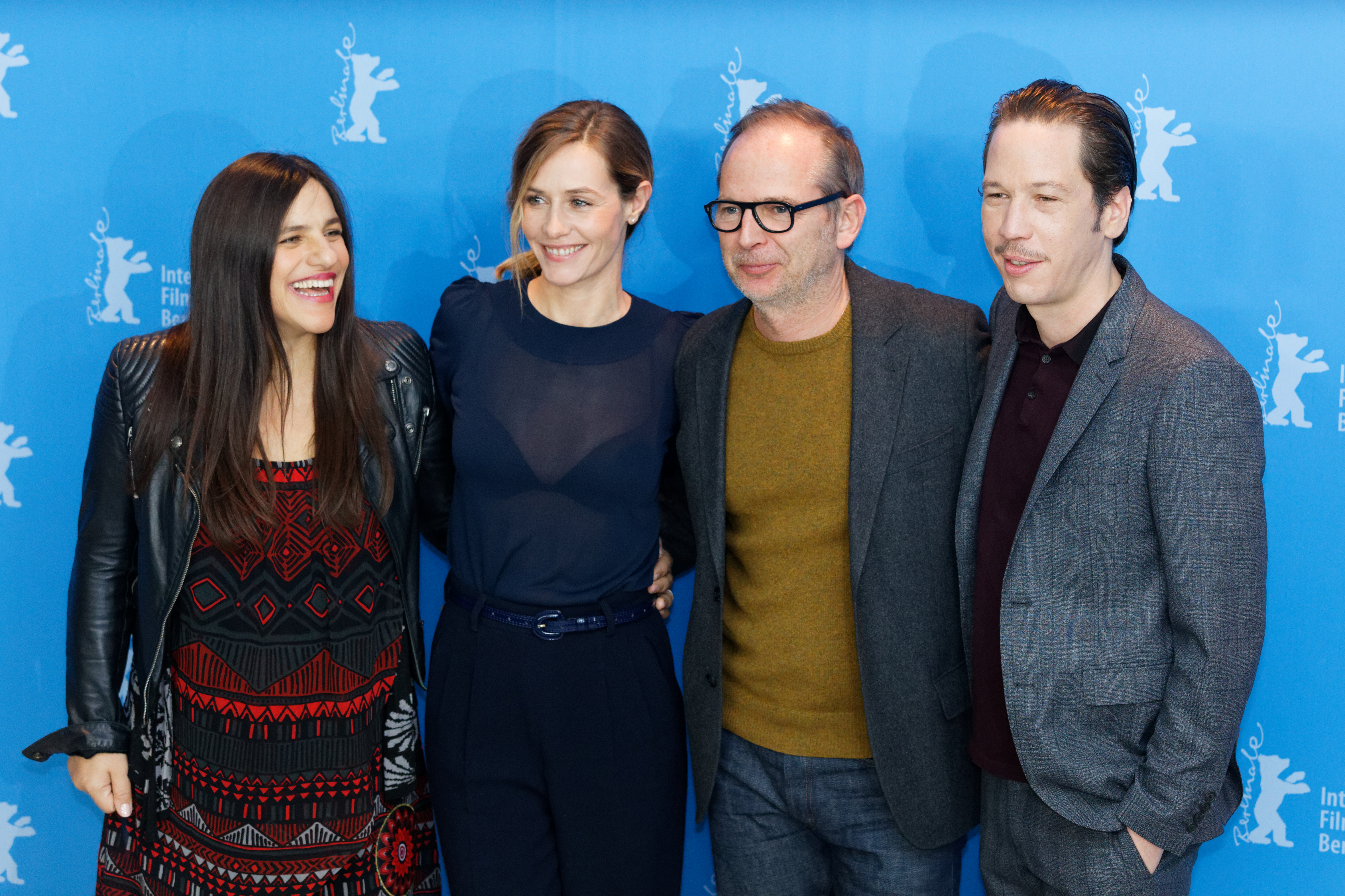 Beáta Palya, Cécile de France, Étienne Comar und Reda Kateb beim Photo Call zu Django bei der Berlinale 2017